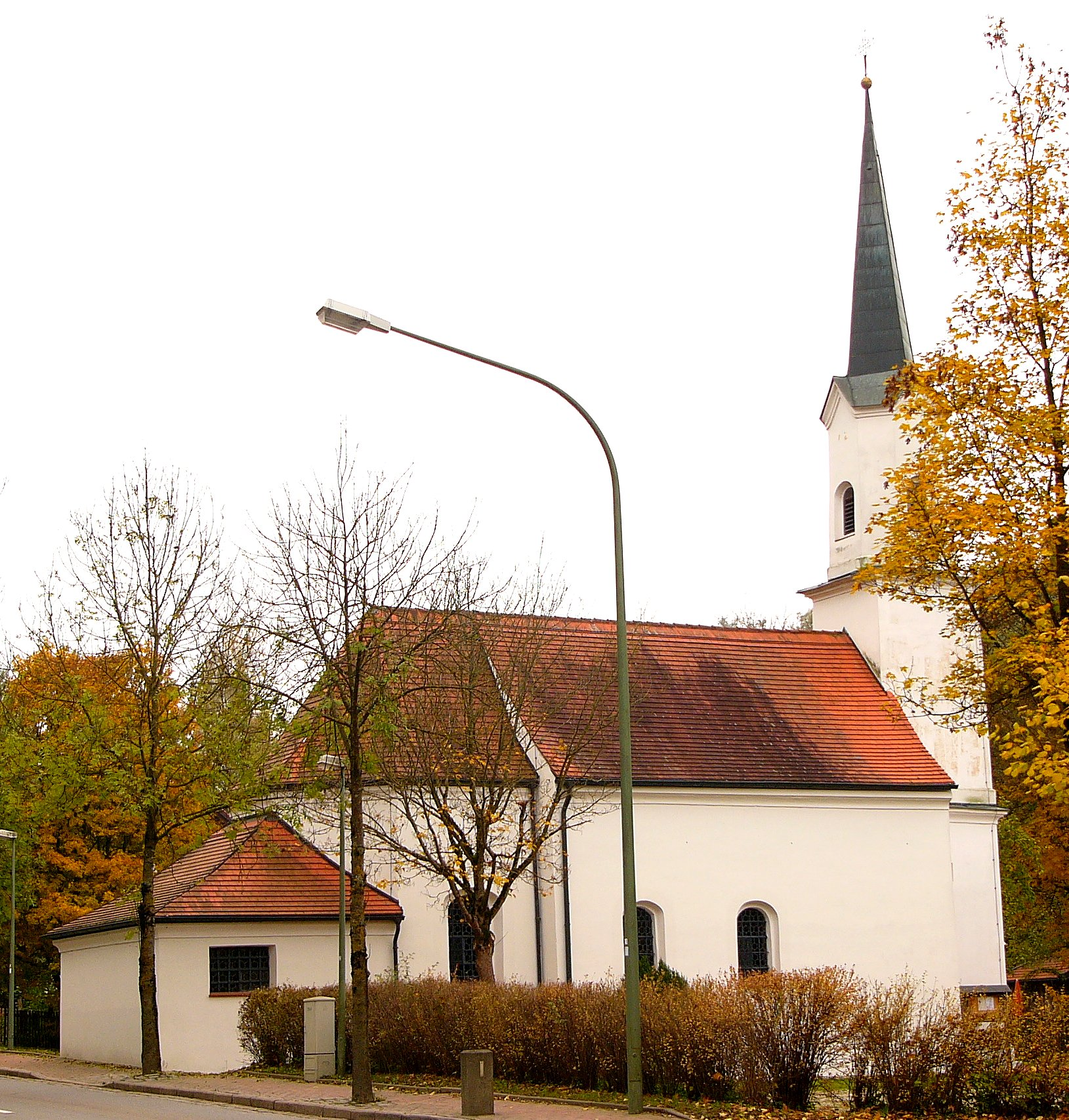 Landshut-Schönbrunn, Filialkirche St. Michael, tonnengewölbter Saalbau mit eingezogenem Chor und Westturm, um 1775; mit AusstattungThis is a photograph of an architectural monument.